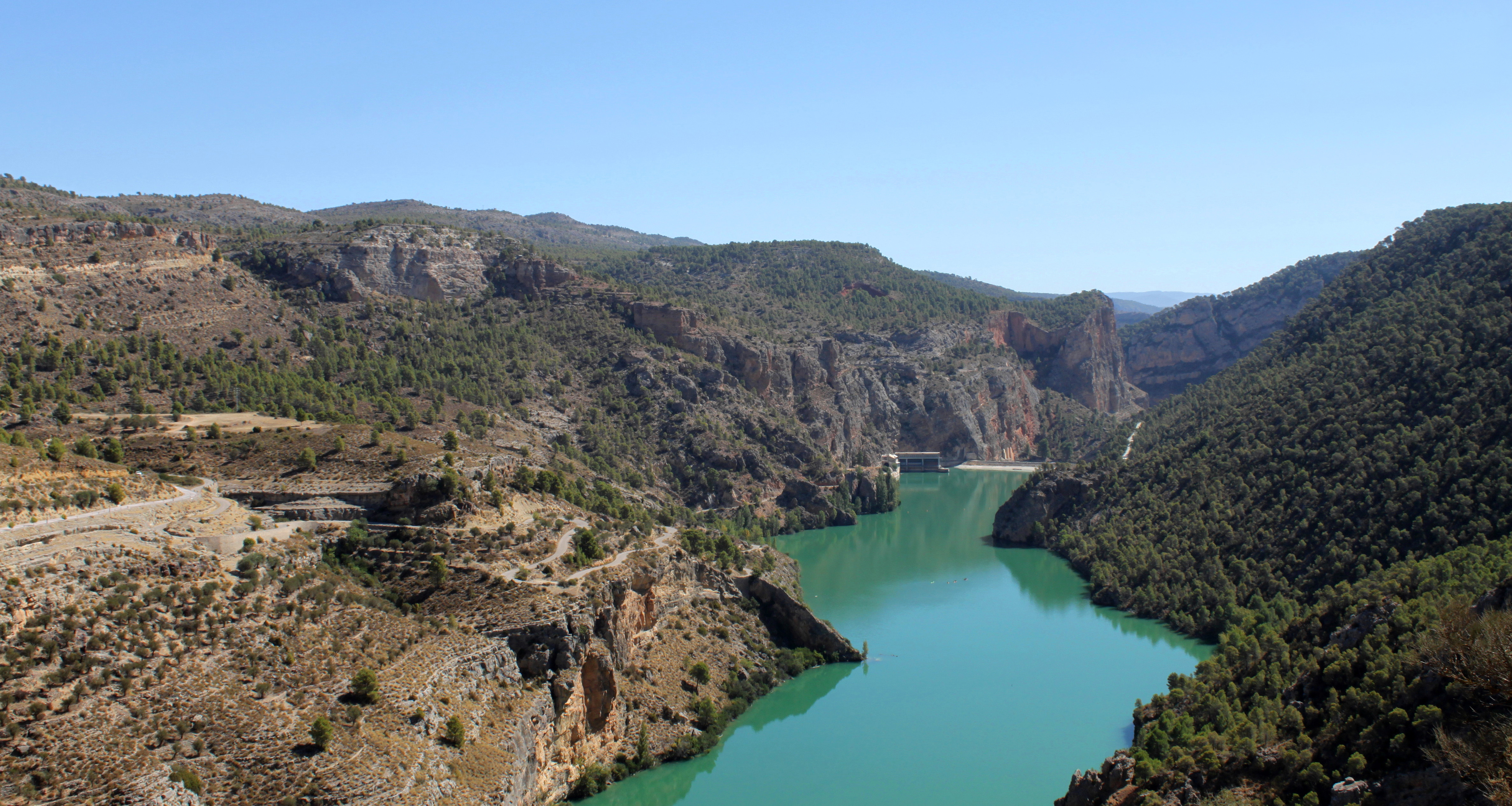 Desde el Santuario: Embalse de El Molinar - 12:15 pm del 16 de septiembre de 2012